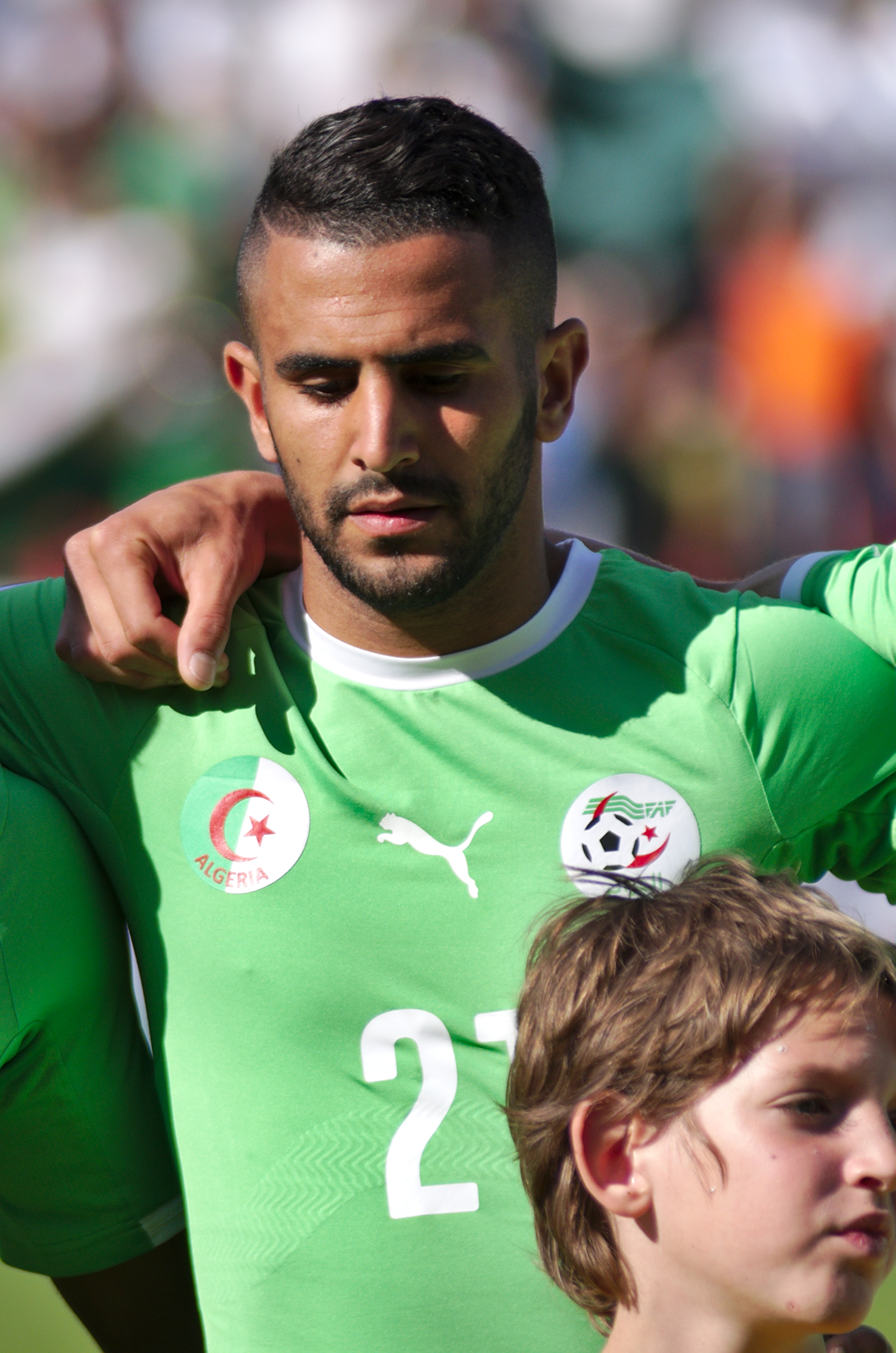 Algérie - Arménie - 20140531 - Riyad Mahrez